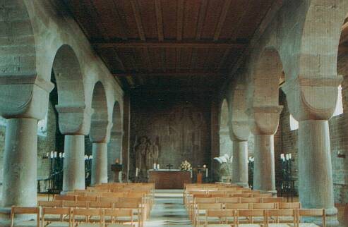 Inneres der Pfarrkirche St. Aurelius in Hirsau von Westen gesehen